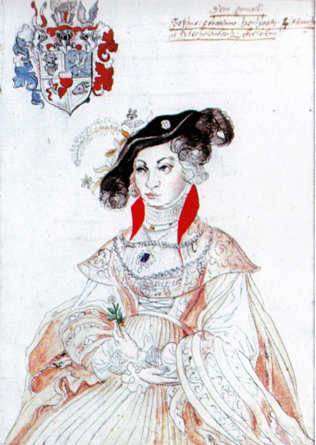 Sophie von Mecklenburg, Ehefrau von Ernst dem Bekenner, in der Lüneburger Bilderchronik von 1595. Federzeichnung und Tusche.